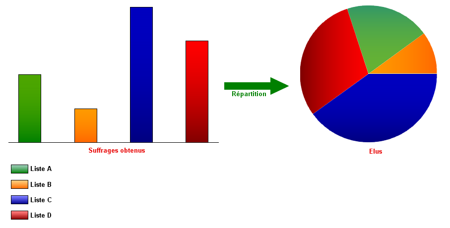 Schéma explicatif du monde de scrutin proportionnel